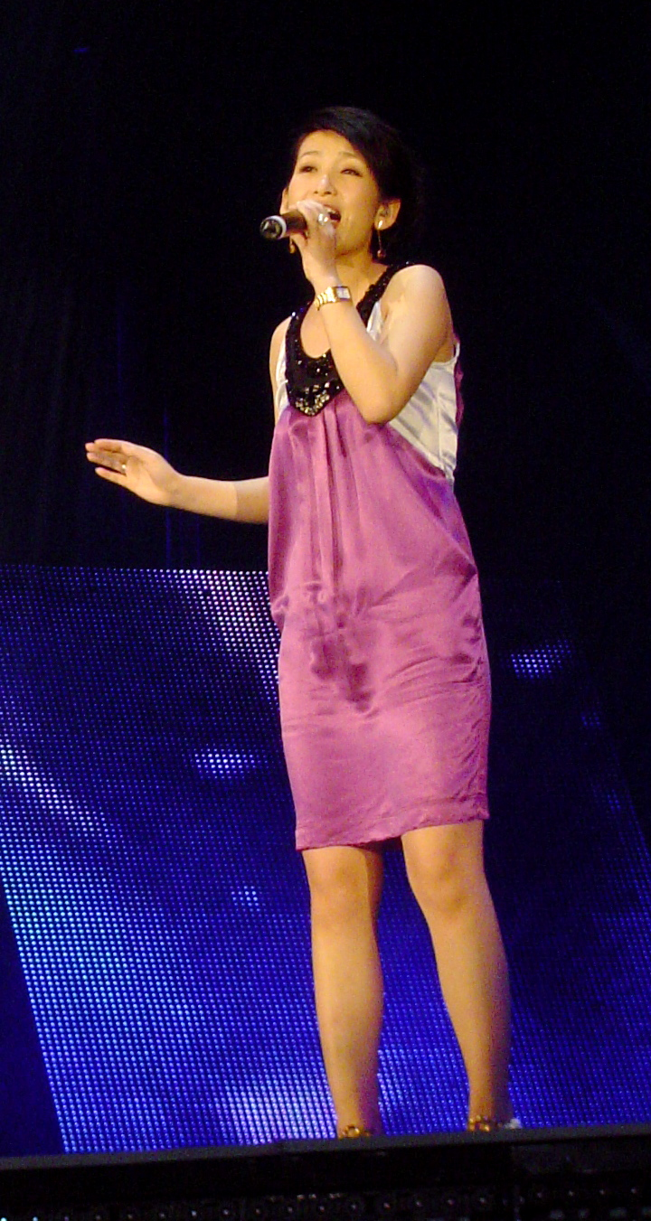 秦海璐